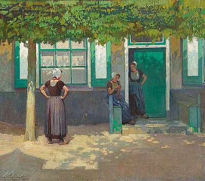 Zeeuwse meisjes onder de wilgen, Domburg